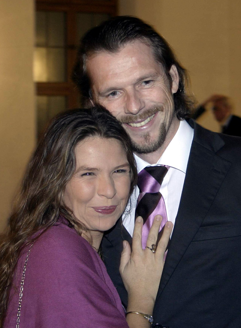 Die Schauspielerin Susanna Wellenbrink (mit Ihrem Ehemann Peter Brandhuber) im November 2007 in München.